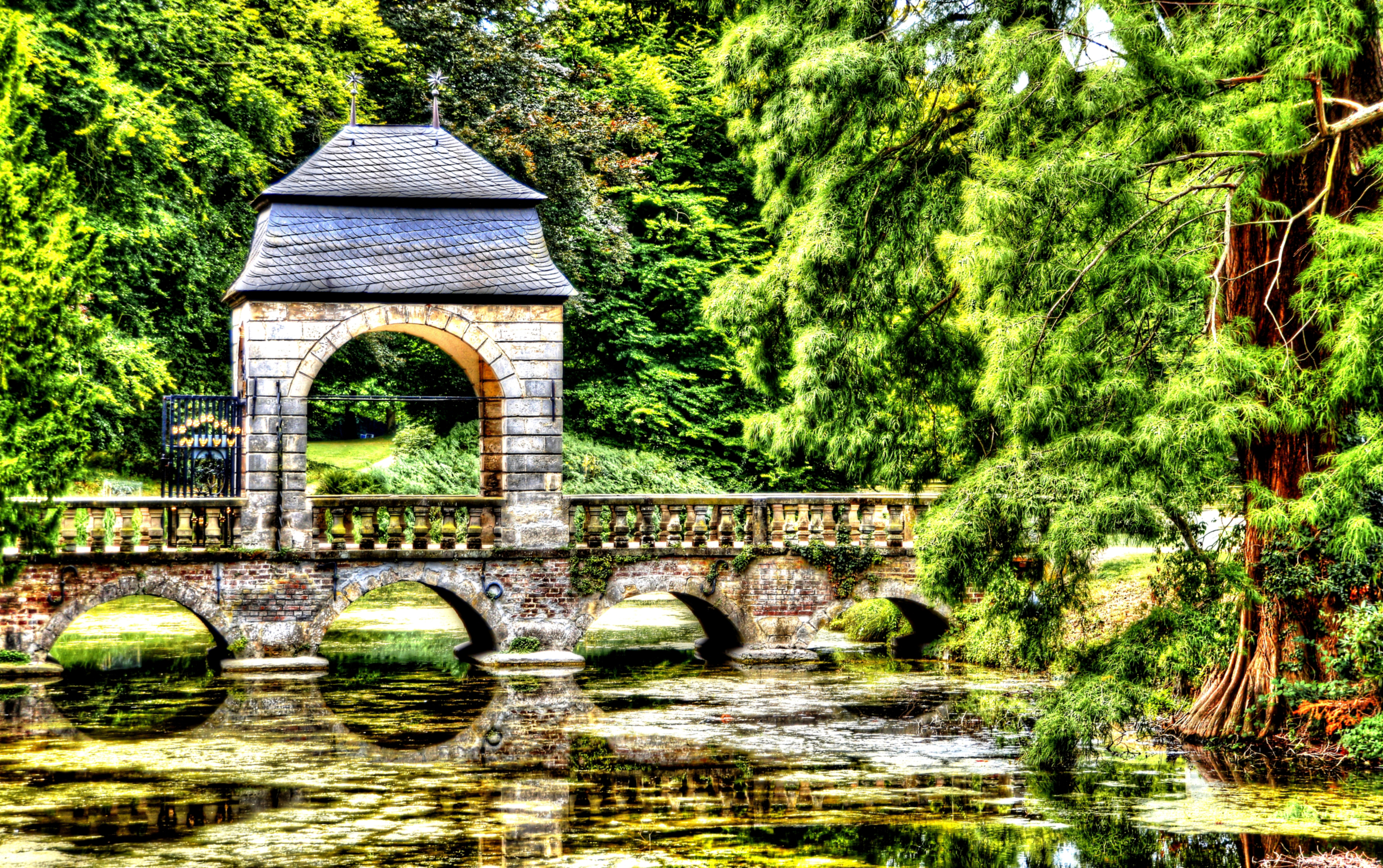 Erste urkundliche Beweise über eine Befestigungsanlage an der Stelle des heutigen Schlosses gibt es aus dem Jahre 1094. Ein Hermannus de Dicco war danach Besitzer der damals noch sehr einfachen Burg. 1383 wurde dem damaligen Besitzer Gerhard von Dyck, genau wie so vielen anderen Rittern am Niederrhein Raubrittertum vorgeworfen. Seine Burg wurde eingenommen und zerstört, doch 10 Jahre später hatte man sie wieder errichtet. Ab 1645 wurde sie durch den kurkölnischen Oberst Ernst Salentin von Salm-Reifferscheidt-Dyck schlossartig ausgebaut. 1961 wurde die gesamte Anlage restauriert und auch die Schäden des 2. Weltkrieges beseitigt. Die wirklich sehenswerte Parkanlage wurde am 1794 von Fürst Joseph Salm-Reifferscheidt-Dyck im Stile eines englischen Gartens gestaltet. Das Schloss liegt zwischen Steinforth und Aldenhoven am Niederrhein. Das betreten der Anlage kostet Eintritt - für meine Erfahrung ein exorbitant hohen Eintrittspreis. Kaum ein anderes Schloss langt derart massiv zu, zumal das fotografieren in den Räumen verboten ist oder man zahlt dafür noch einmal einen extra Obolus!!! (modernes Raubrittertum). In vergleichbaren Schlossparks wie z.B Nymphenburg zahlt man keinen Eintritt.